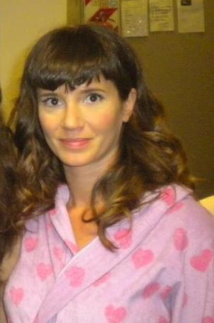 foto de griselda que me saque con ella adentro de polka en los pasillos despues de grabar ;) la corto asi la ven solo a es::Griselda Siciliani :)